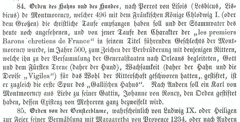 Passage uit Ackermann's Ordenbuch, Gustav Adolph Ackermann, uitgegeven in Annaberg in Duitsland in 1855, Blz. 209.